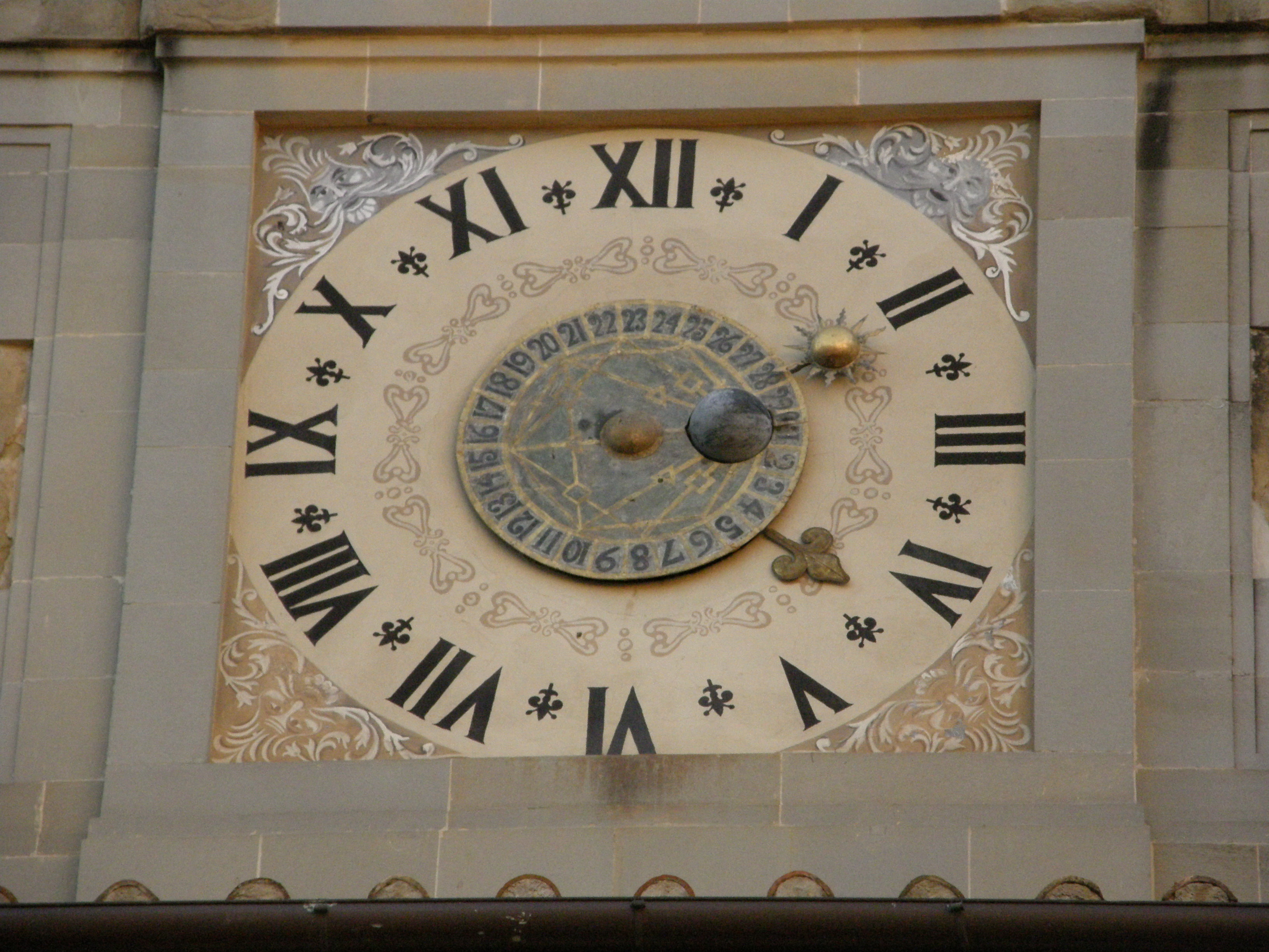 Arezzo - Italy, Piazza Grande, Palazzo della fraternità dei laici ad Arezzo, Orologio di Felicia da Fossato, 1552